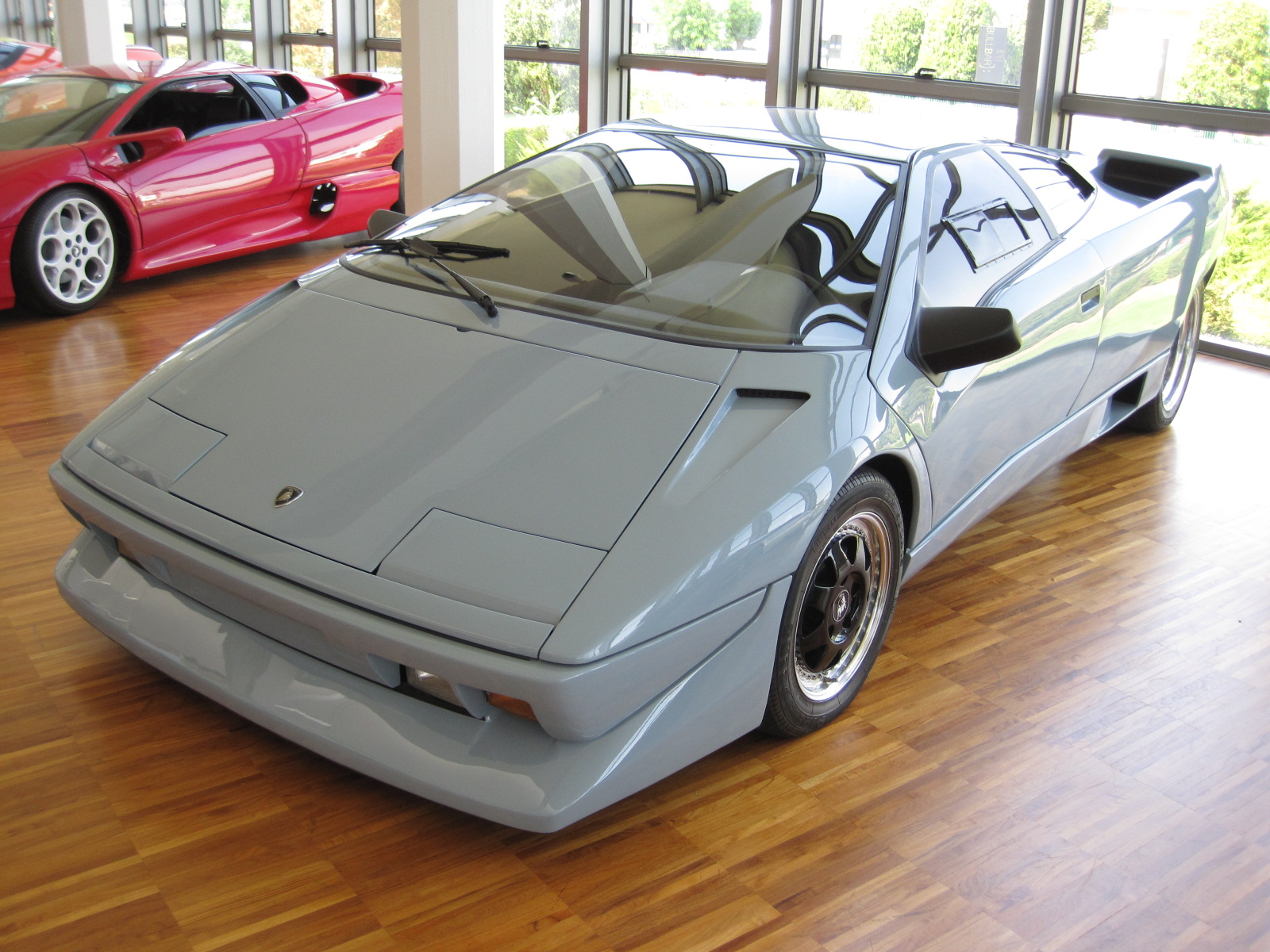 Musée Lamborghini